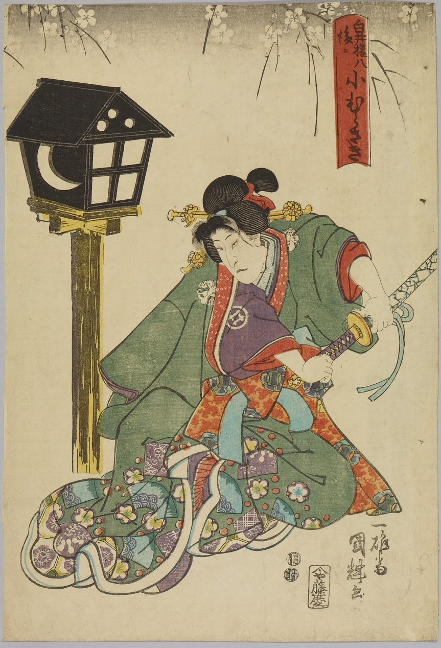 一雄斎國輝画「白井権八 後二小むらさき」、大判錦絵